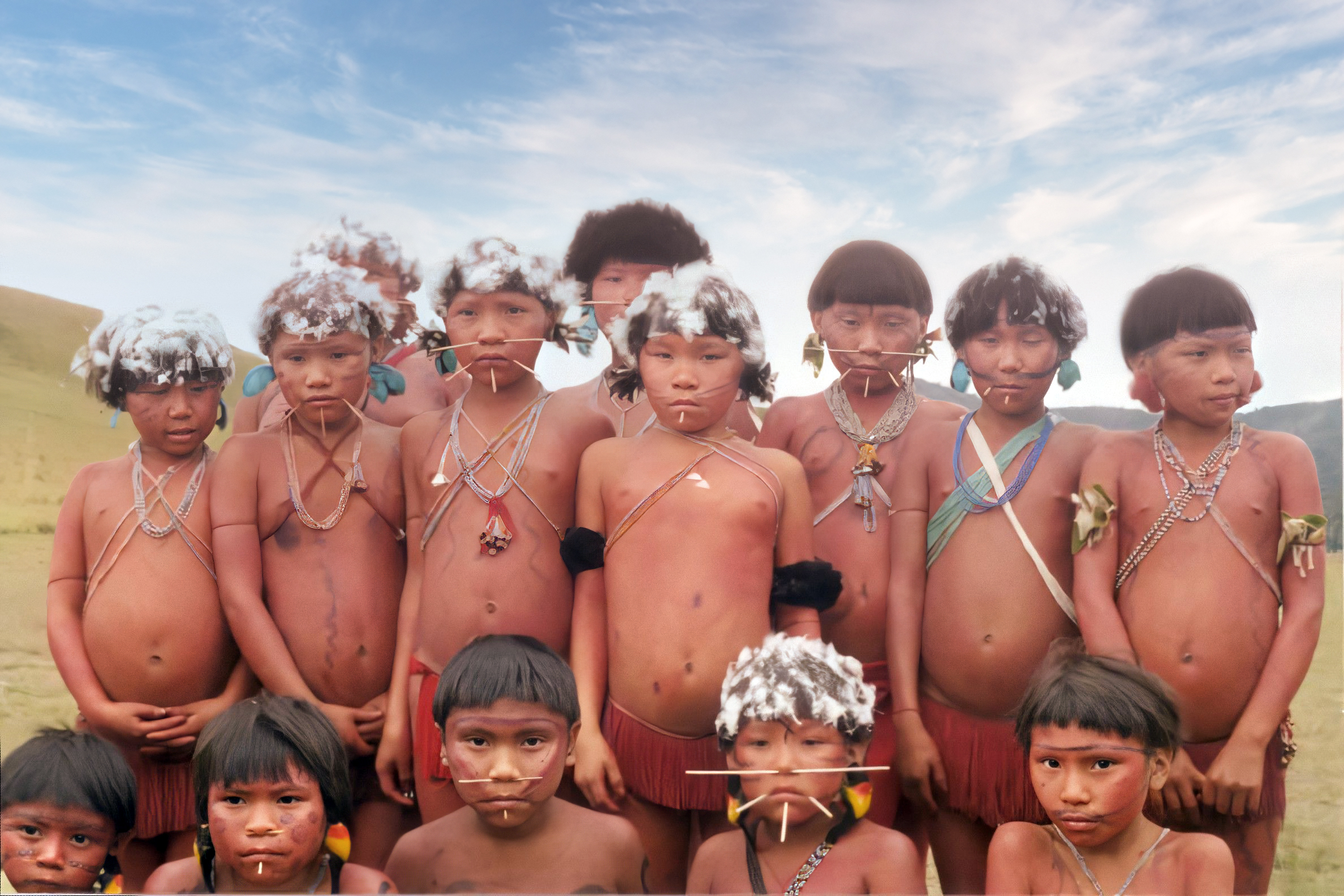 Etnia Yanomami del Estado Amazonas, Venezuela en el alto orinoco.